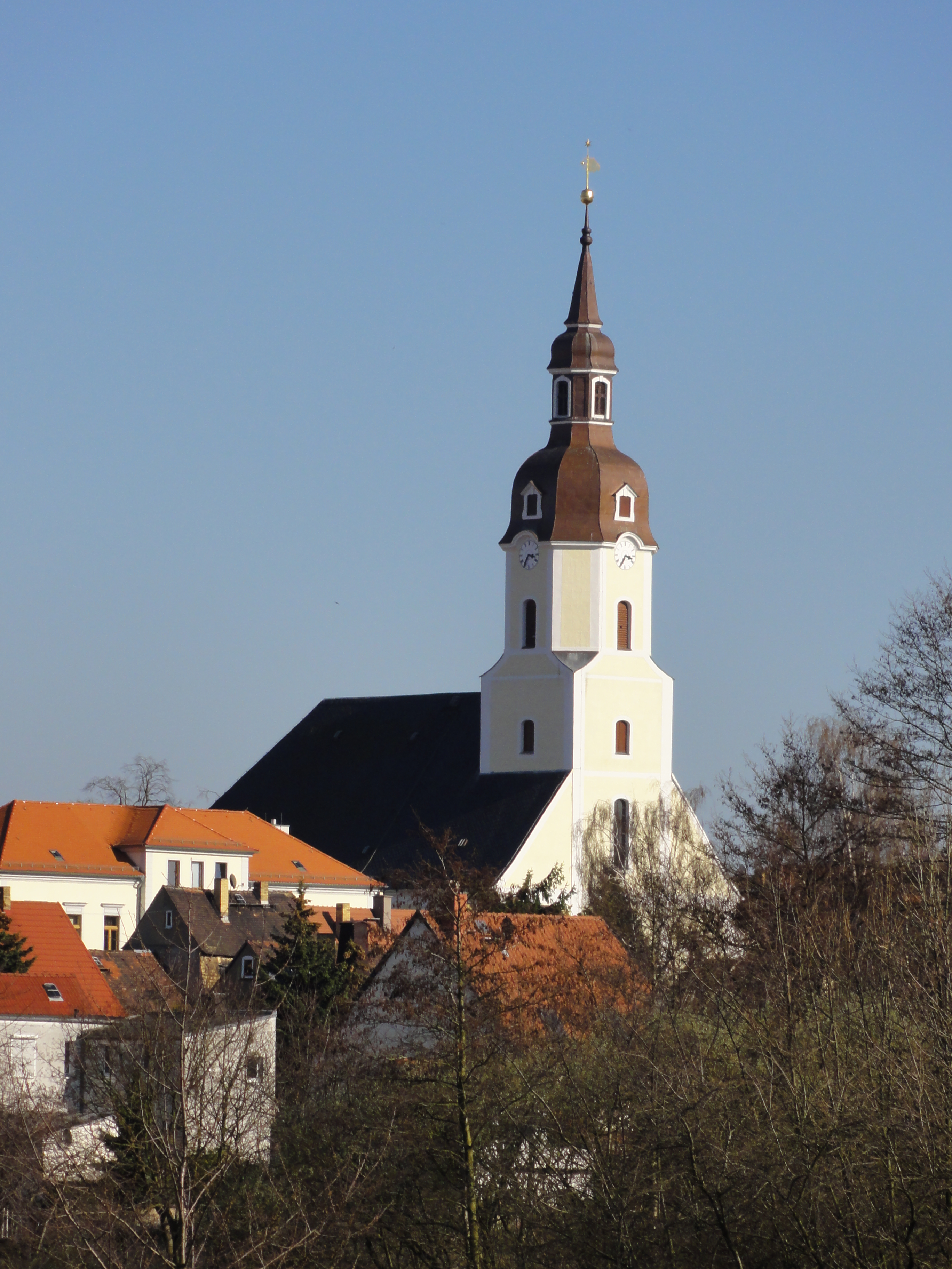 St. Moritz-Kirche in Taucha - Blick von Gutenbergstraße